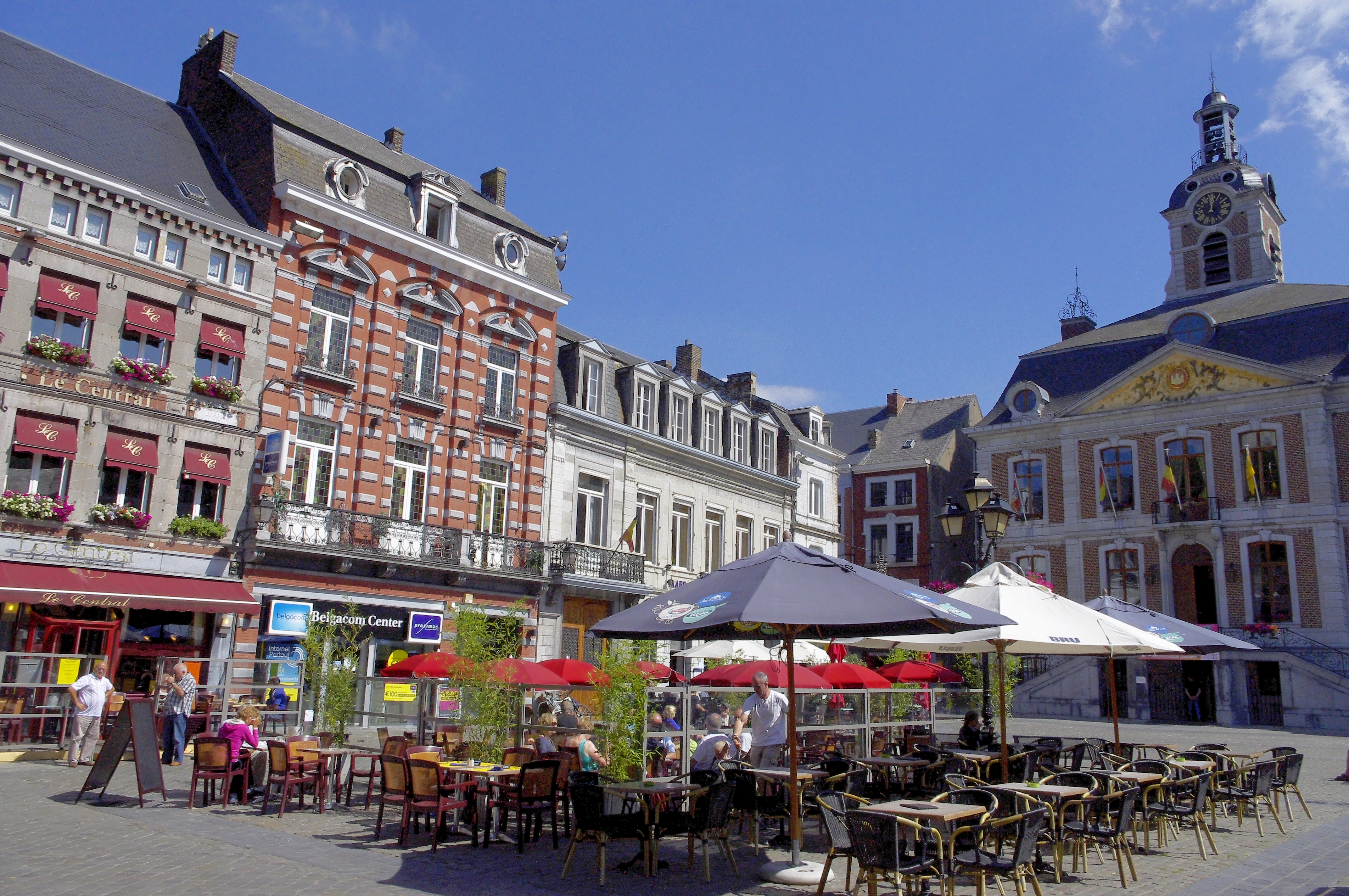 Huy - la Grande Place avec l'hôtel de ville